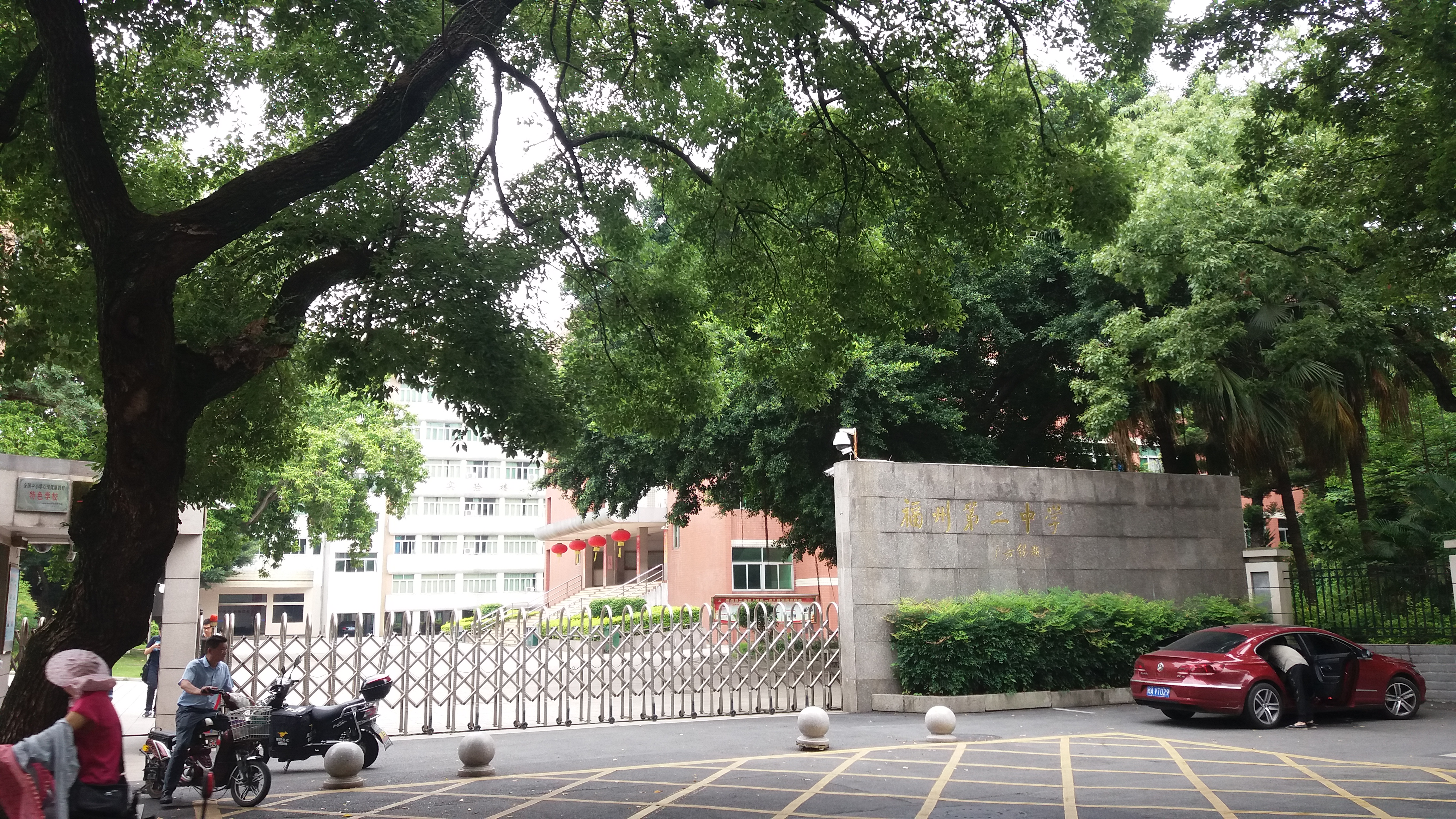 福州第二中学的校门